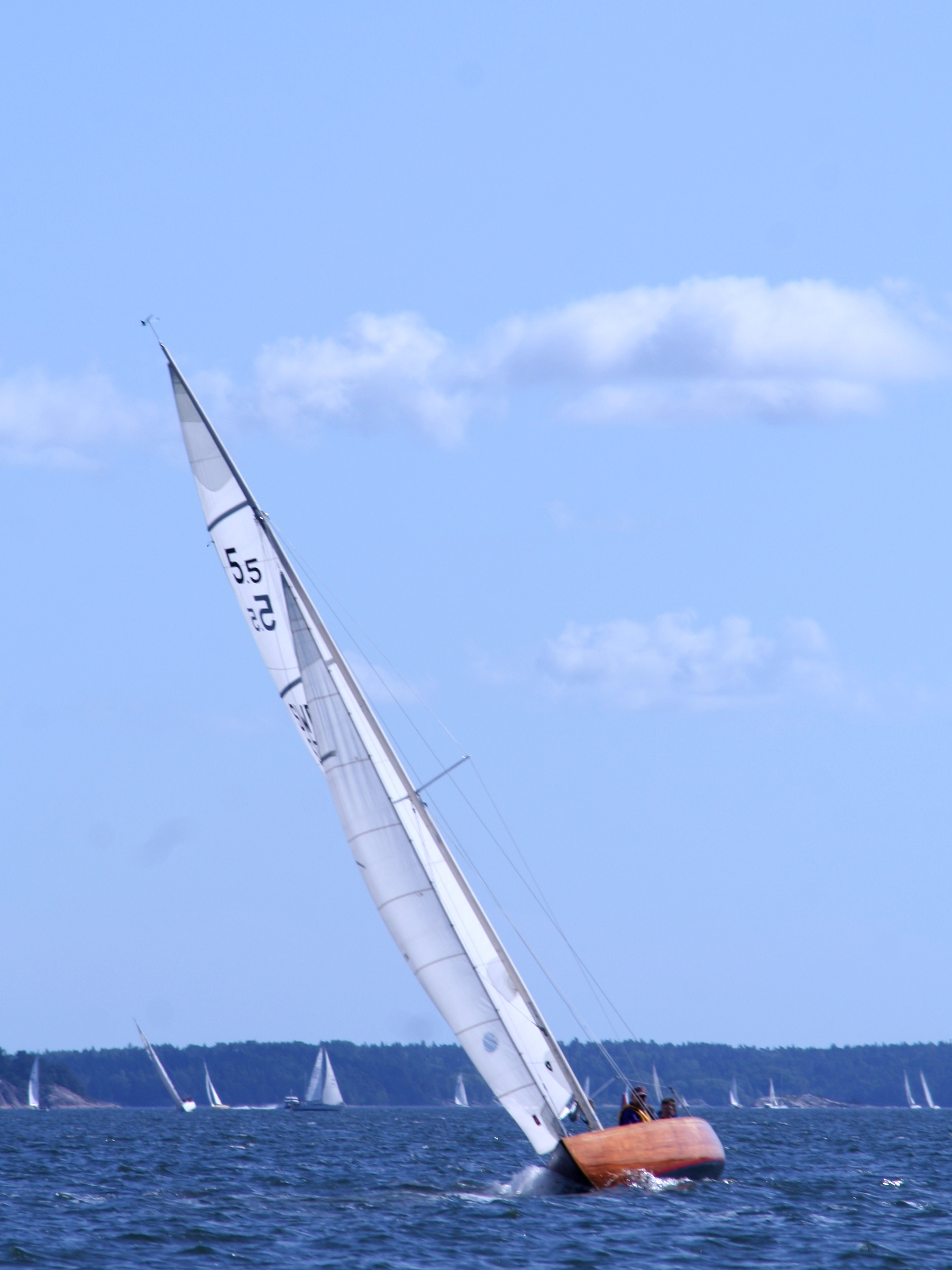 En femfemma (5,5m) på Västra Saxarfjärden i Stockholms skärgård. Källa: eget foto, fotograf EnDumEn 23 augusti 2009